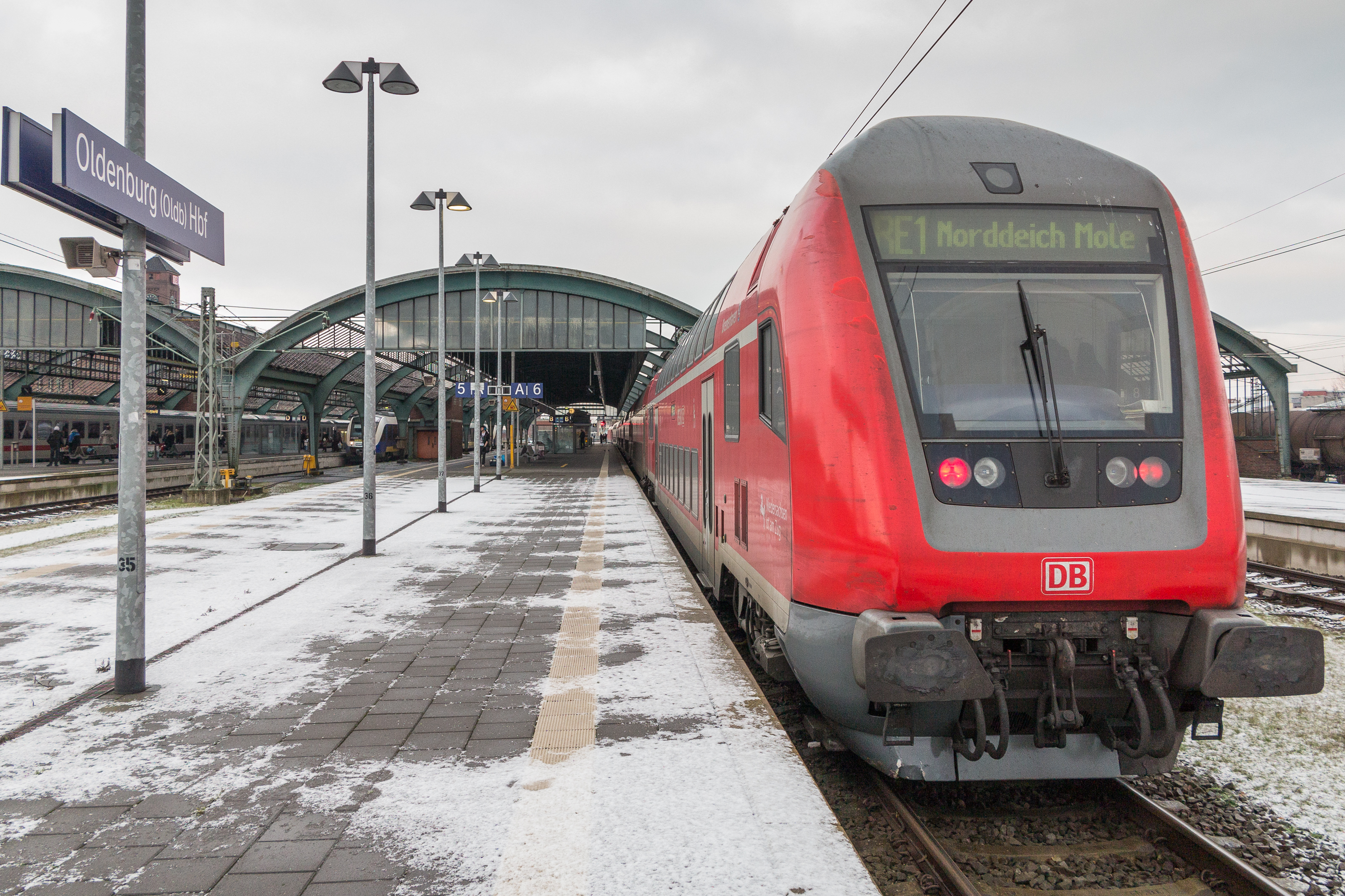 Bahnsteig des Oldenburger Bahnhofs mit RE nach Norddeich Mole (Dez. 2014)